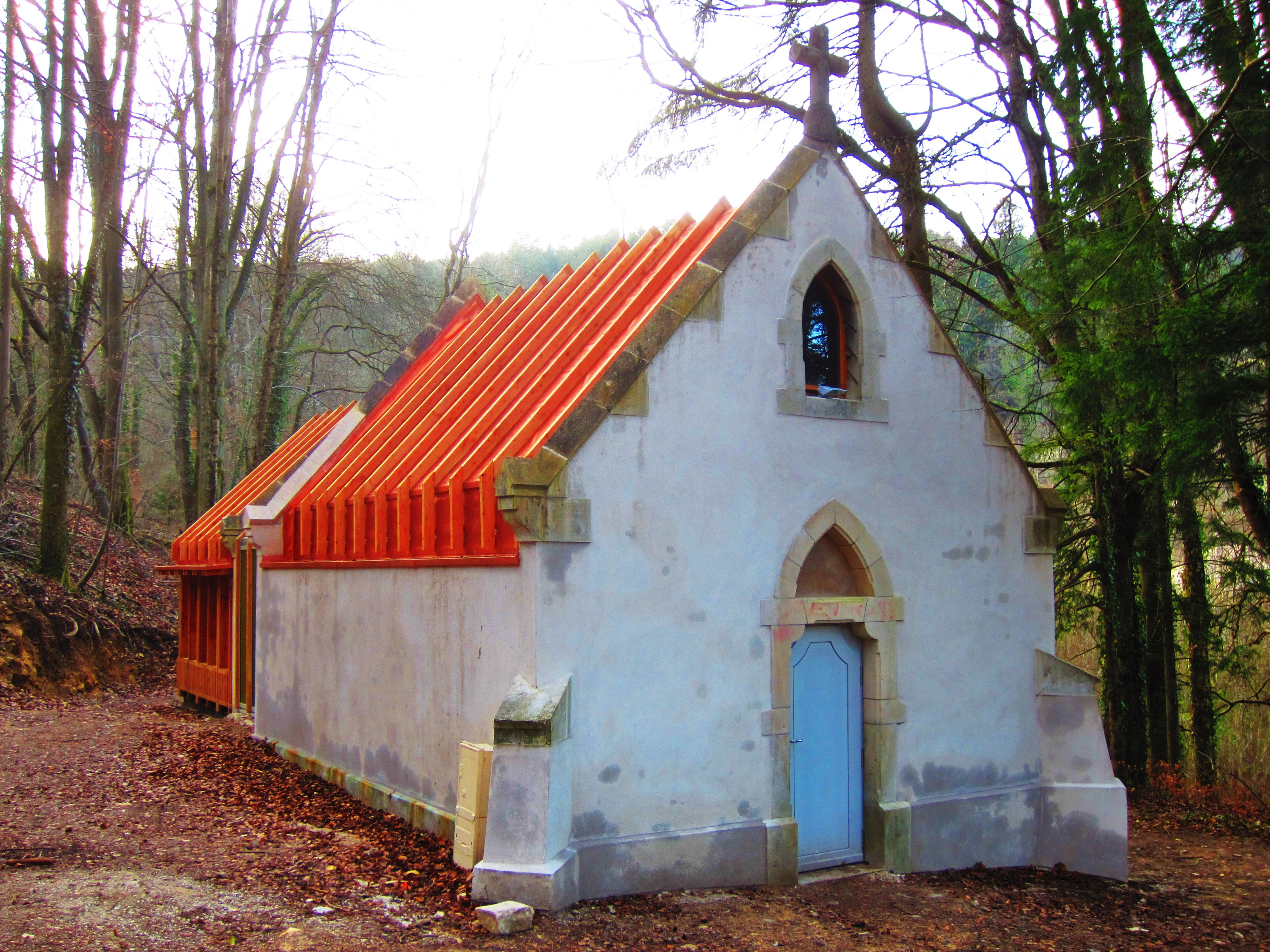 St Maurice Cotes ste genevieve